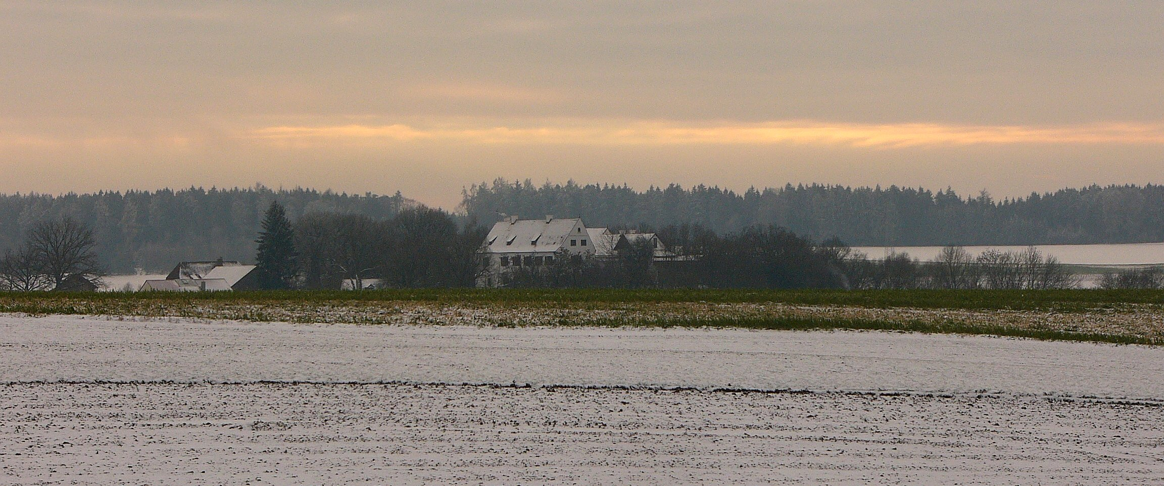 Blick auf Kirchberg - Ortsteil von Hohenthann.